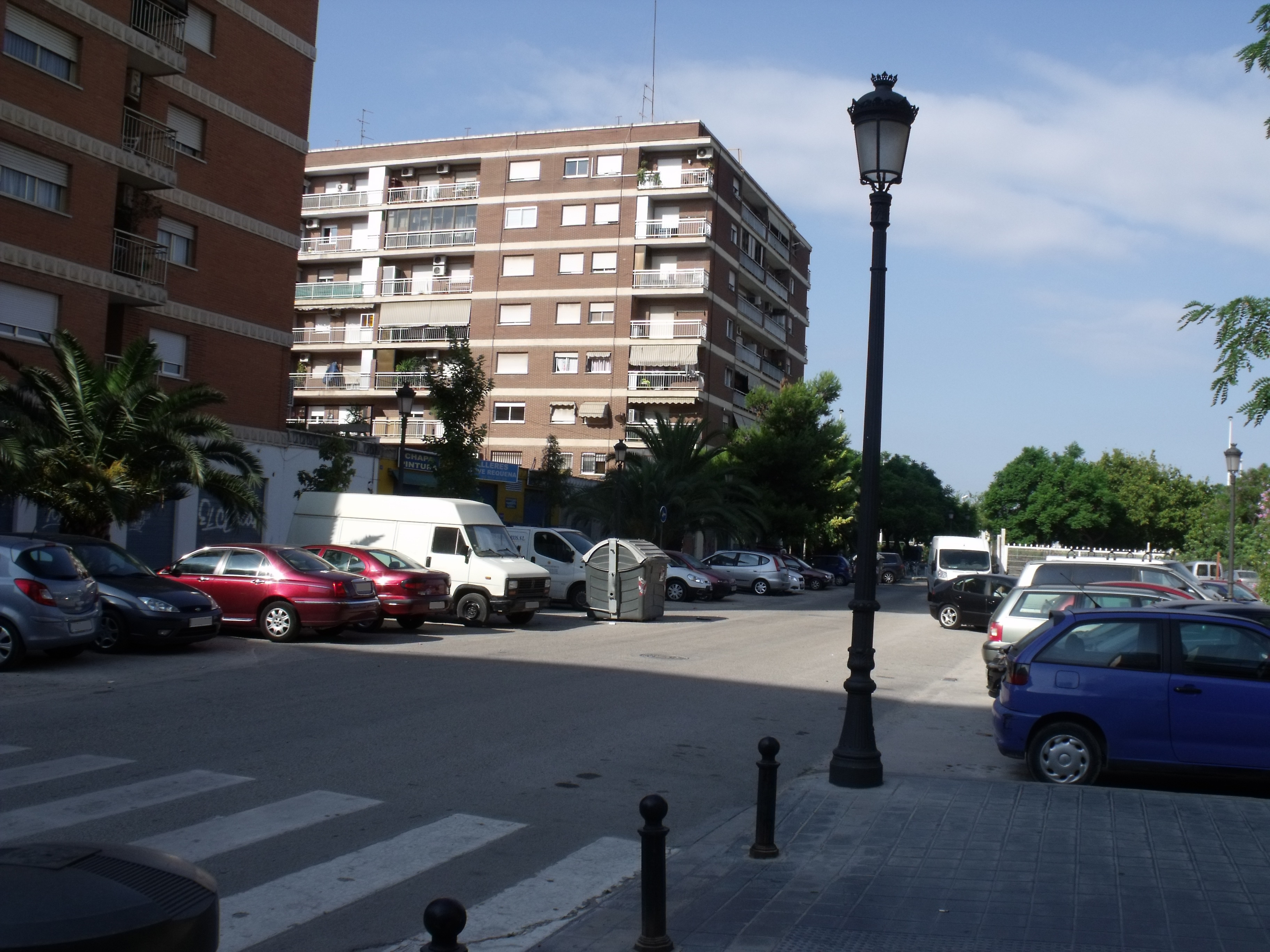 Calle Segunda República Española. Valencia.